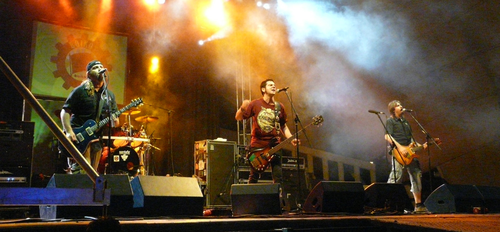 Imagen del concierto de Boikot en el barrio de Hortaleza (Madrid) celebrado el 11 de junio de 2009 en el Auditorio Pilar García Peña.